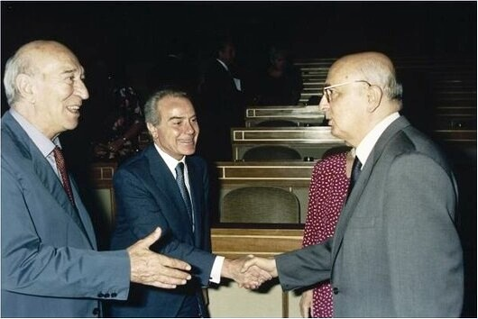 Il Presidente della Camera dei Deputati Giorgio Napolitano interviene alla presentazione del libro di Giovanna Bochicchio Schelotto "Caino il Buono", incontrando Giuliano Montaldo e Gianni Letta